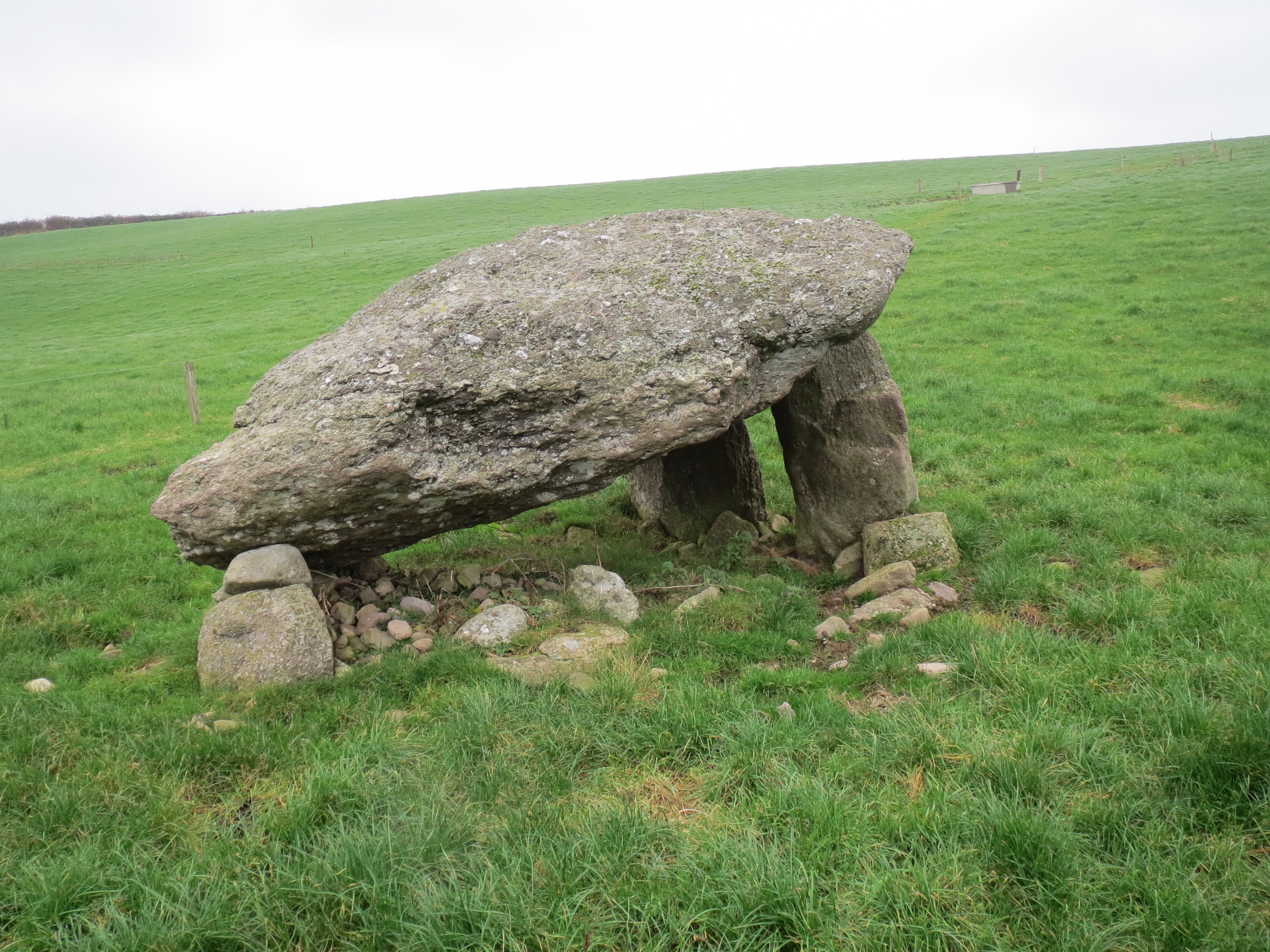 Ballyquin Portal Tomb